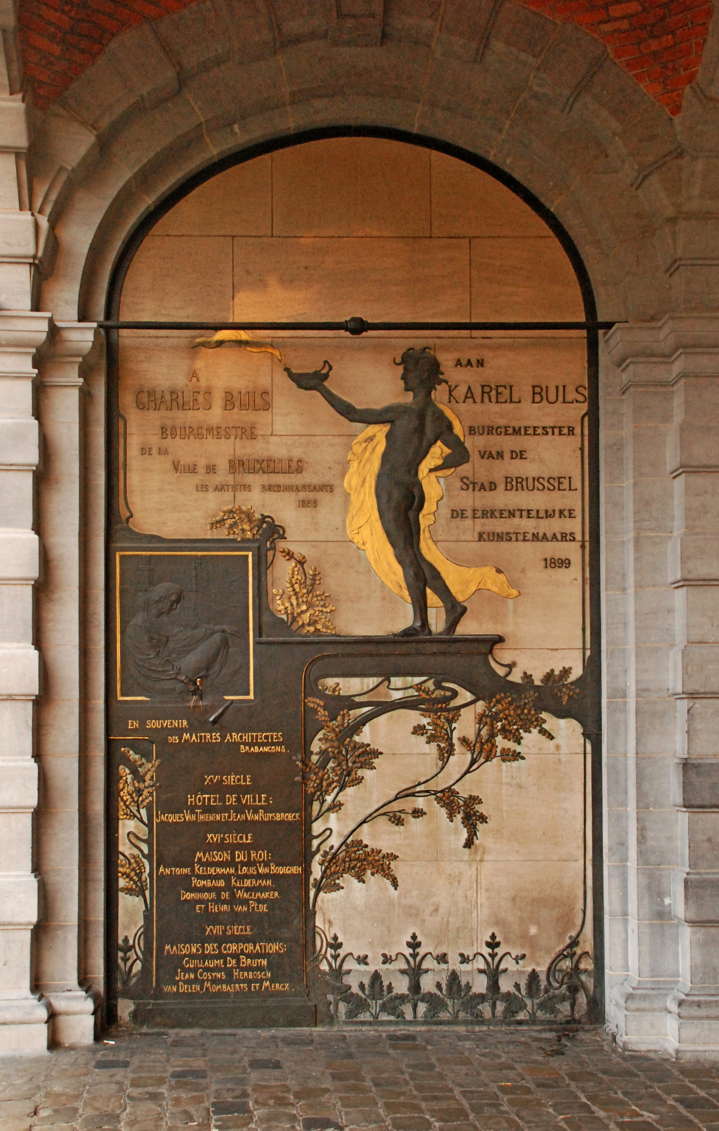 Belgique - Bruxelles - Monument à Charles Buls (Art nouveau, Victor Horta et Victor Rousseau, 1899)